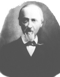 Baron Alexandre Louis Guillaume Jacomin de Malespine (1821-1893), deutsch-französischer Adliger und Gutsbesitzer, aus Zweibrücken